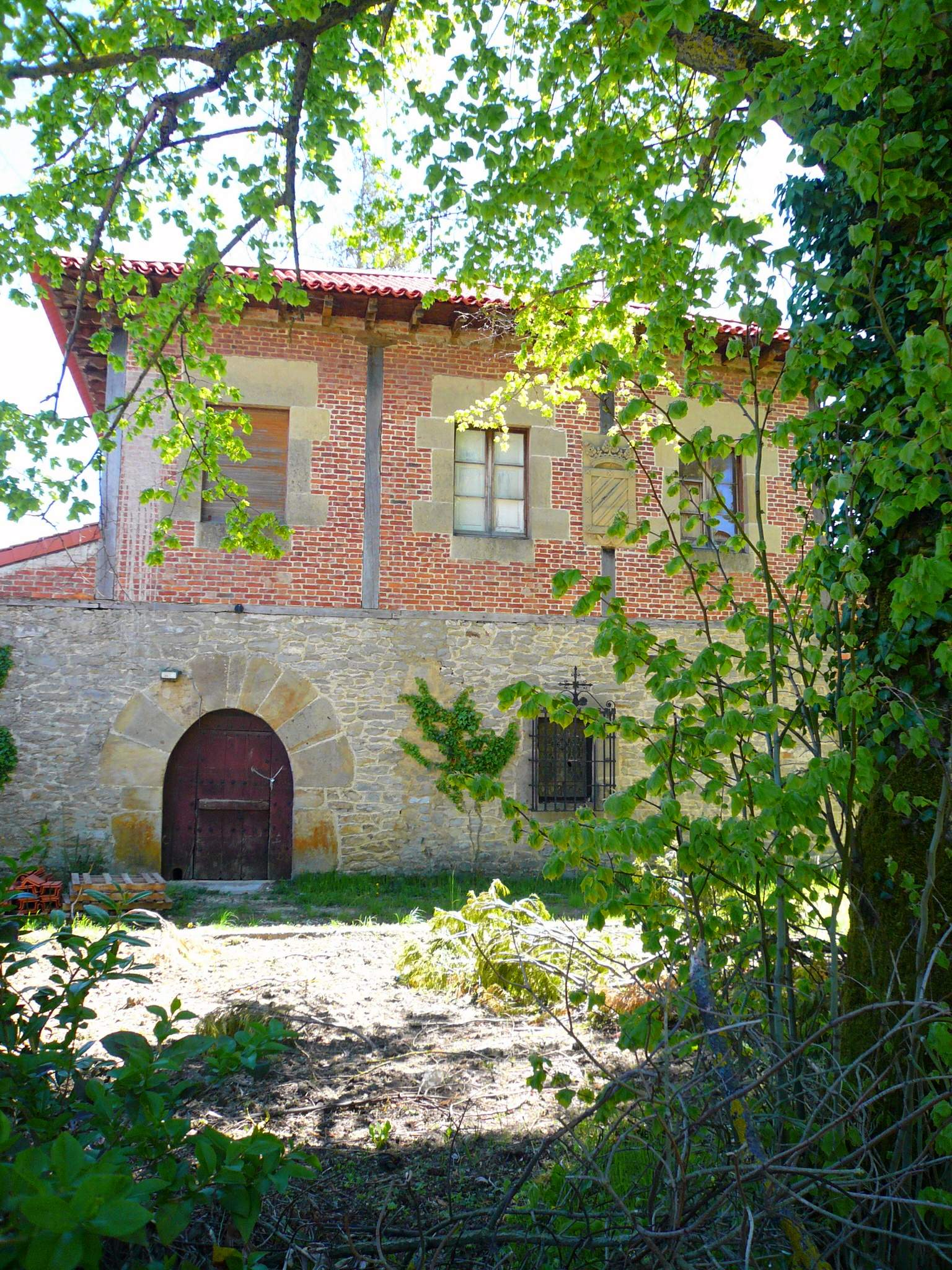 Palacio del Marqués de Foronda (Foronda, Vitoria, Álava)